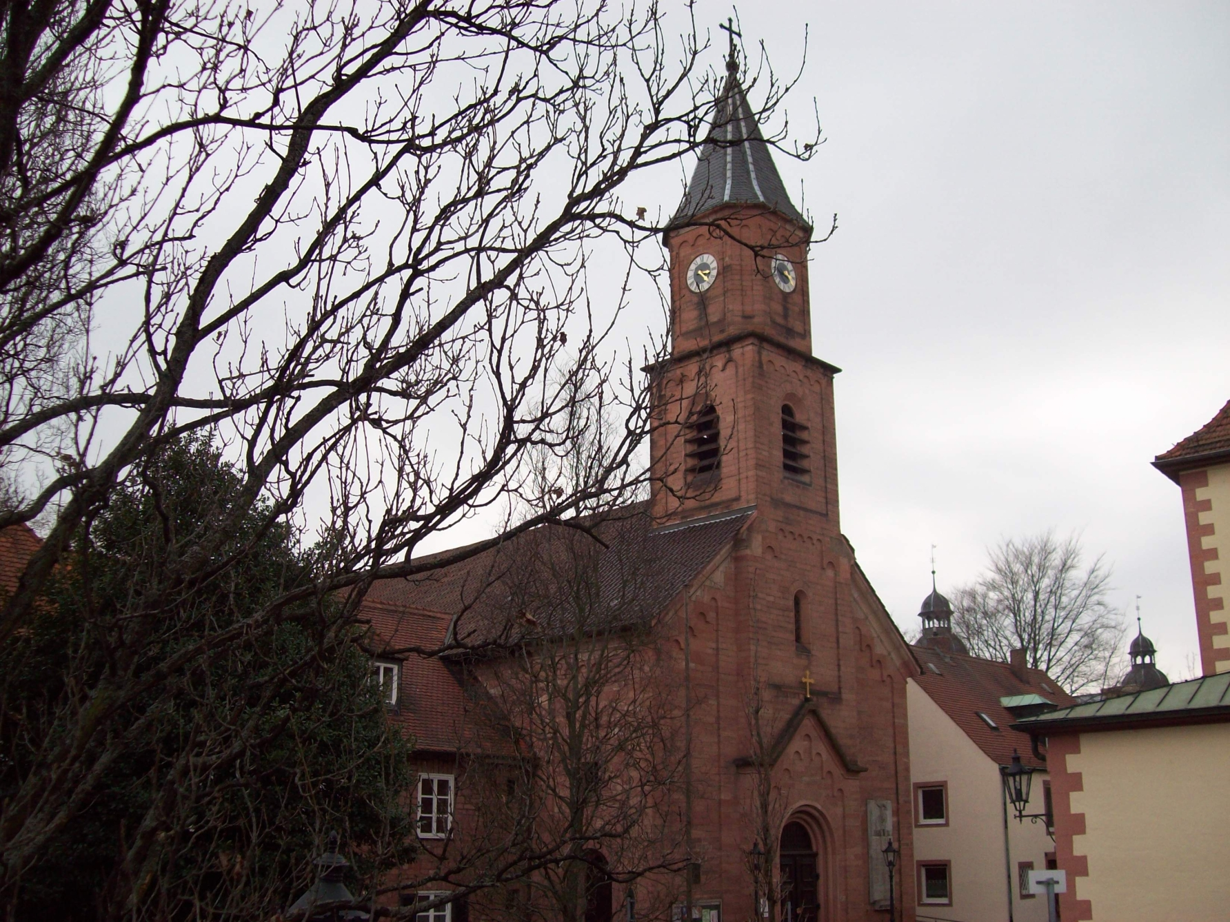 Christuskirche Aschaffenburg Außenansicht aus der Pfaffengasse